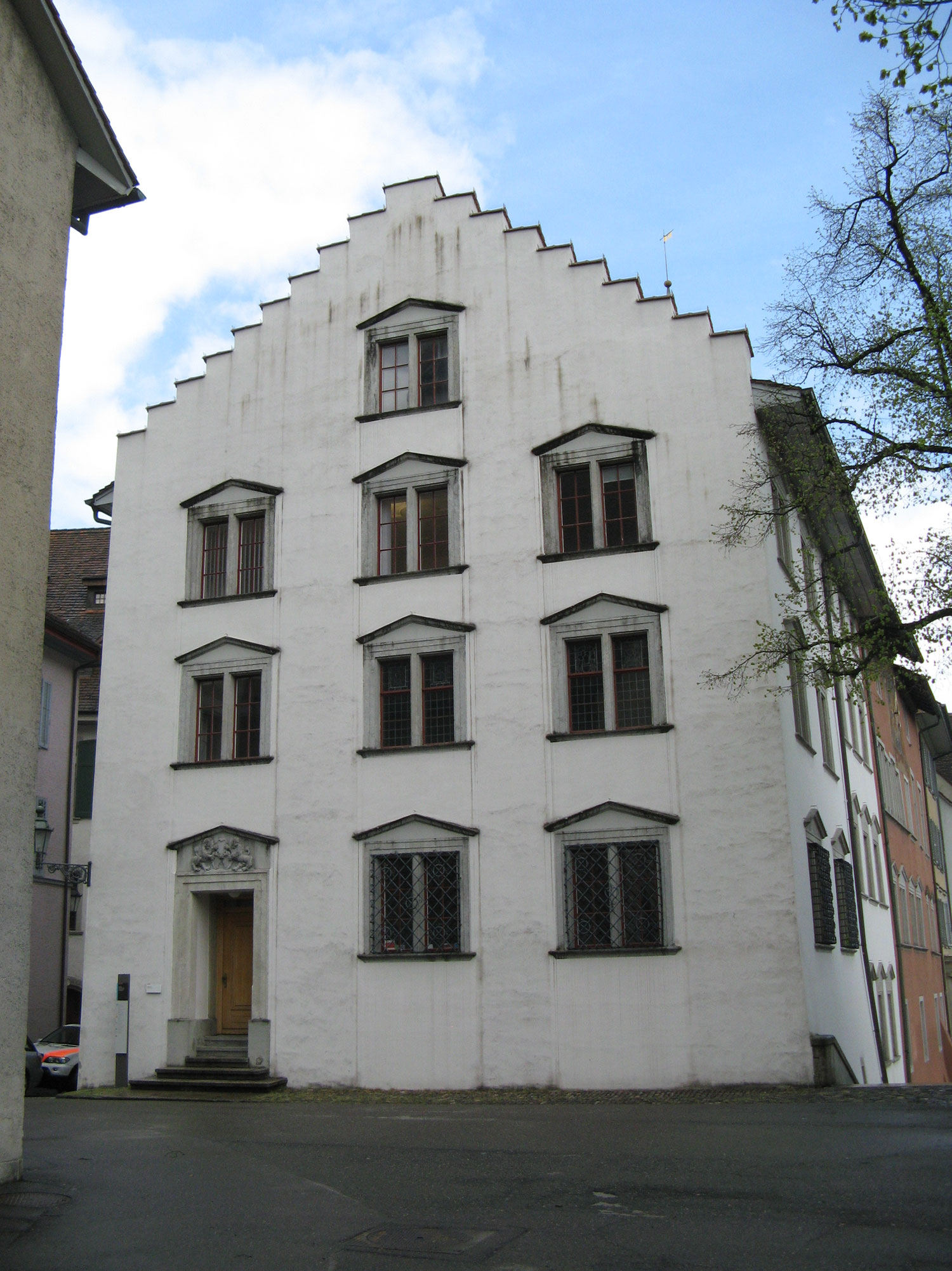 Stadtkanzlei, Teil des Rathauskomplexes in Baden